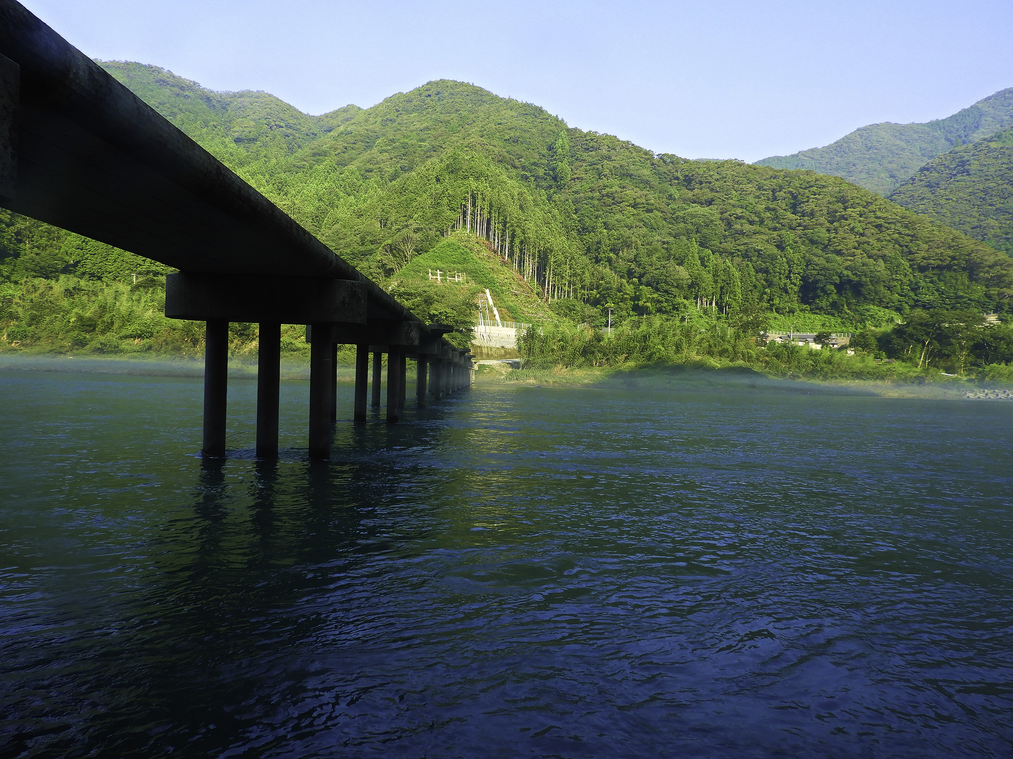 名越屋沈下橋 仁淀川で最も下流の沈下橋